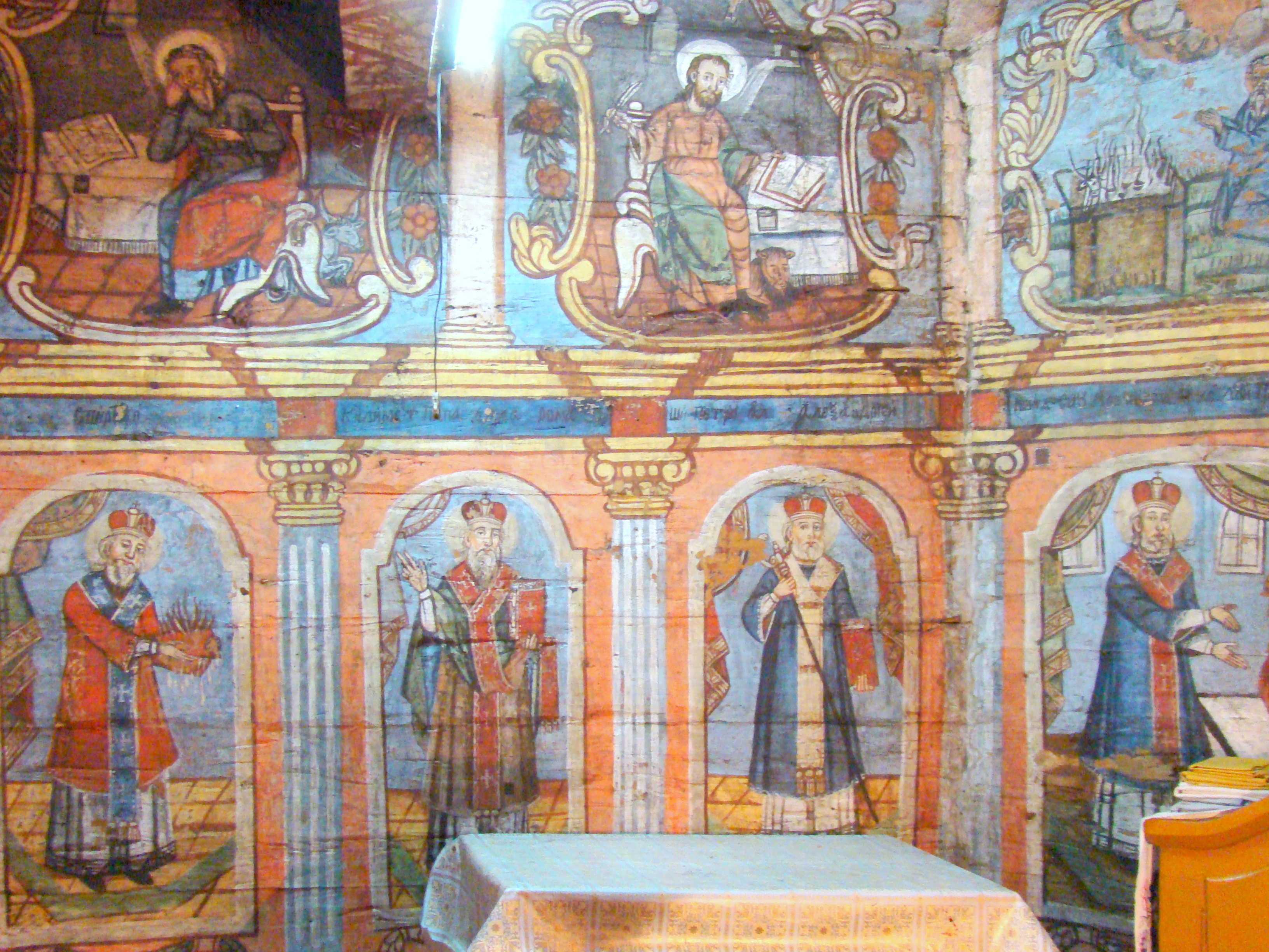 Biserica de lemn din Budești-Josani, județul Maramureș